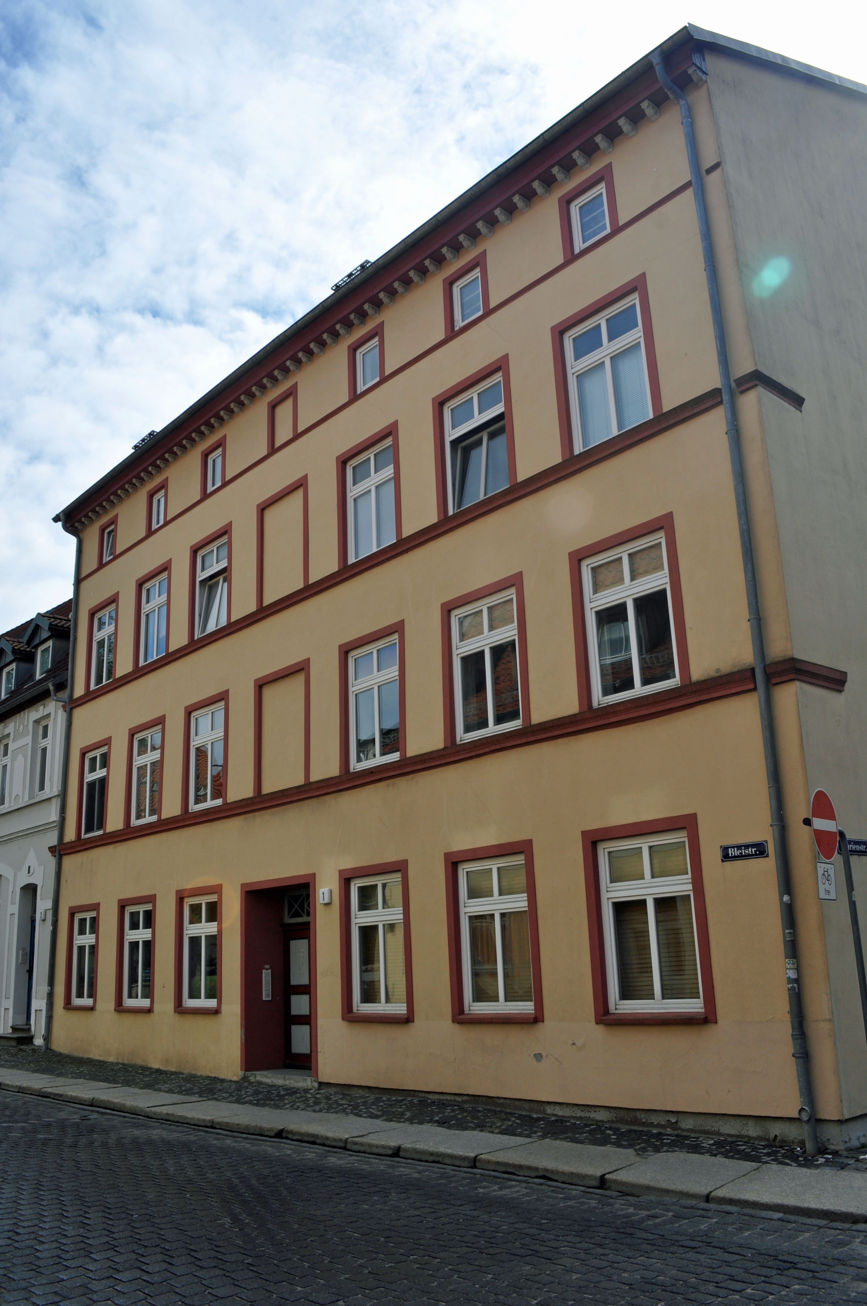 Gebäude in Stralsund, siehe Dateiname